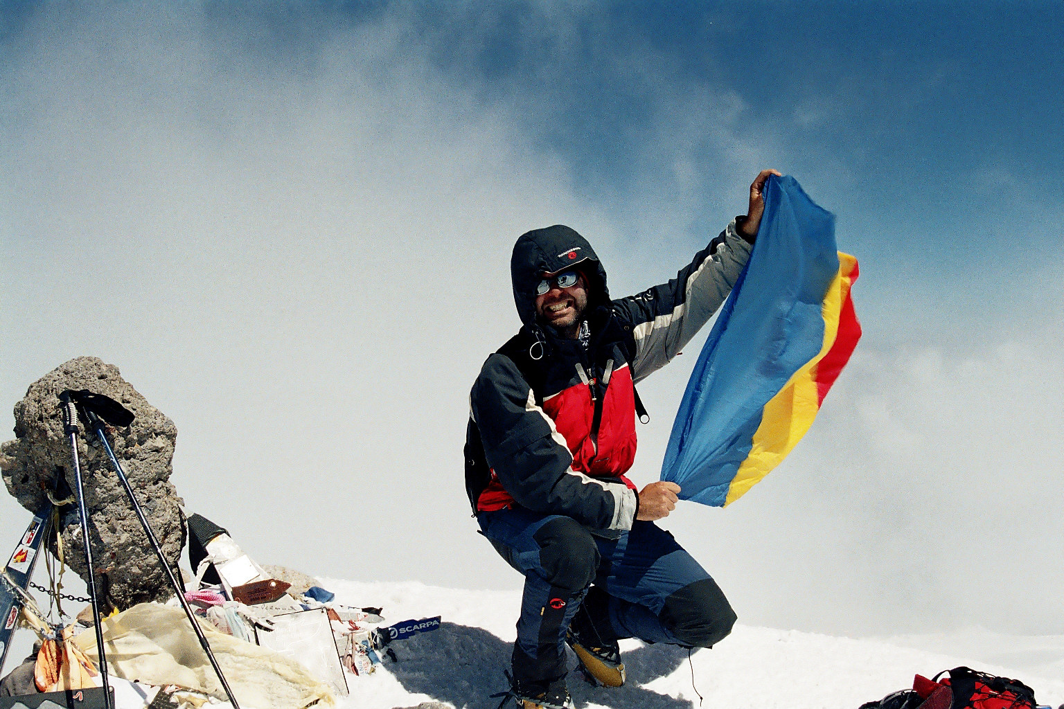 Mount Elbrus